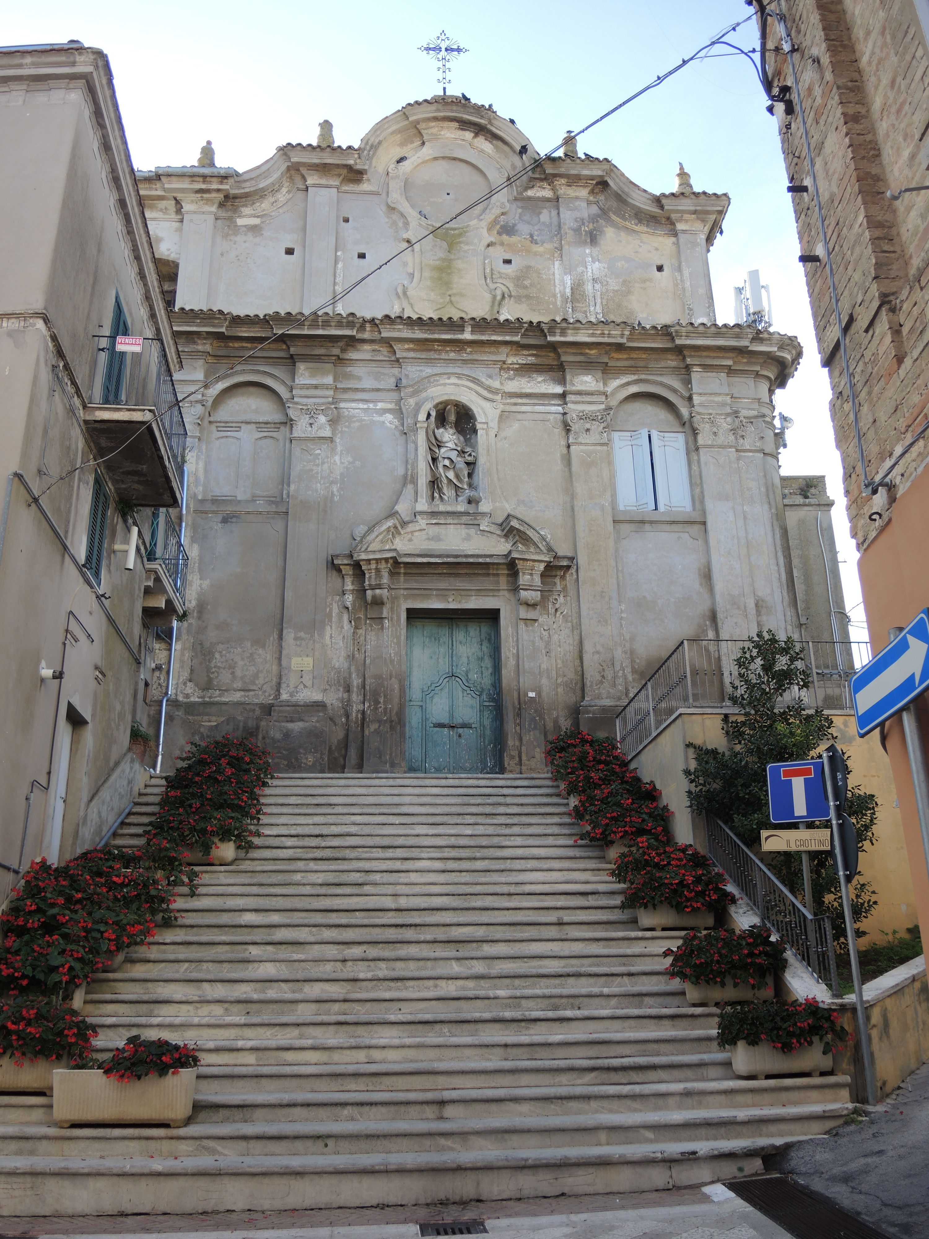 Città Sant'Angelo: Chiesa di Sant'Agostino